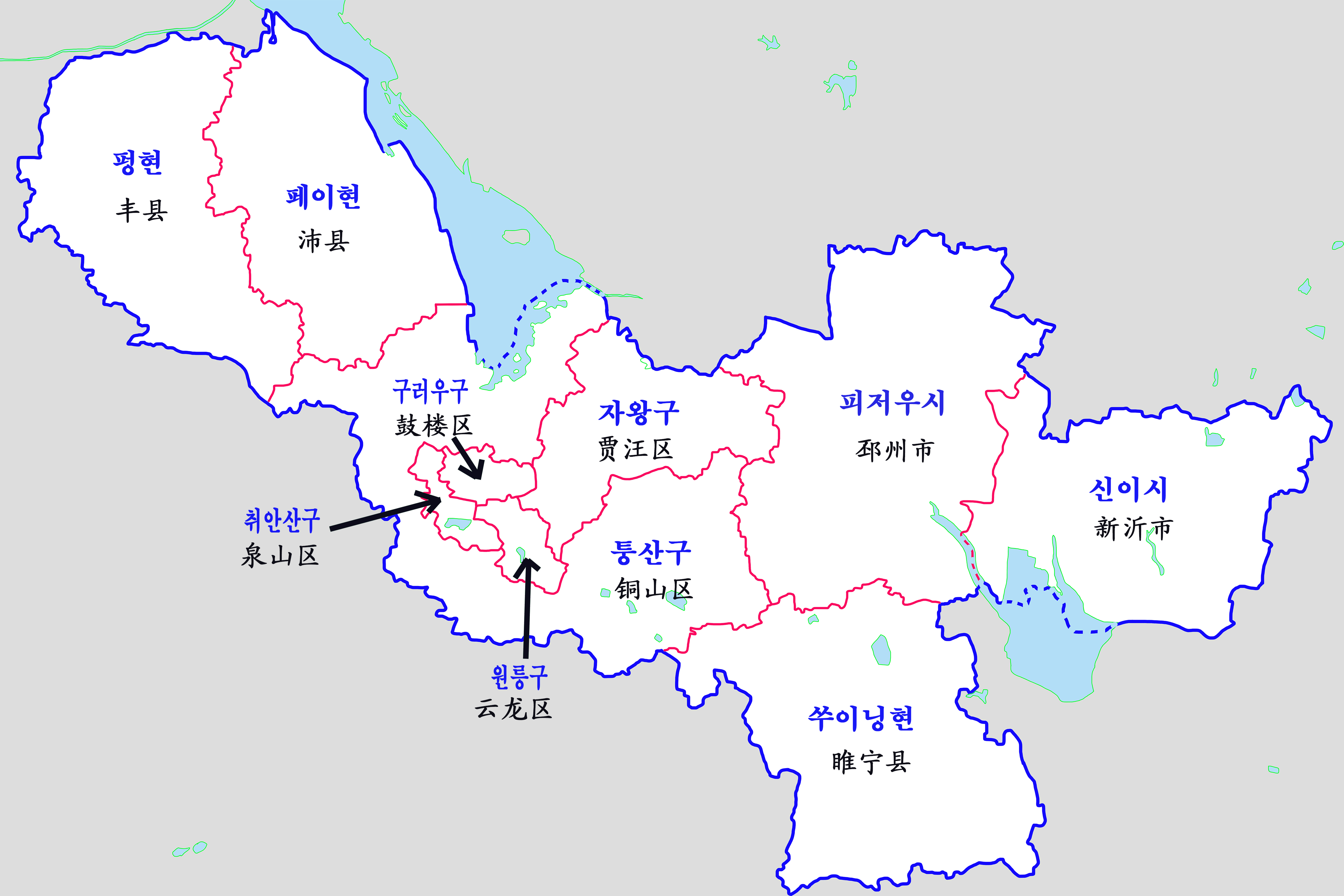 장쑤성 쉬조우시 현급구역도